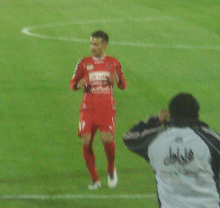 Vlatko Grozdanoski, Persepolis-Malavan match, 2012-13 Iran Pro League